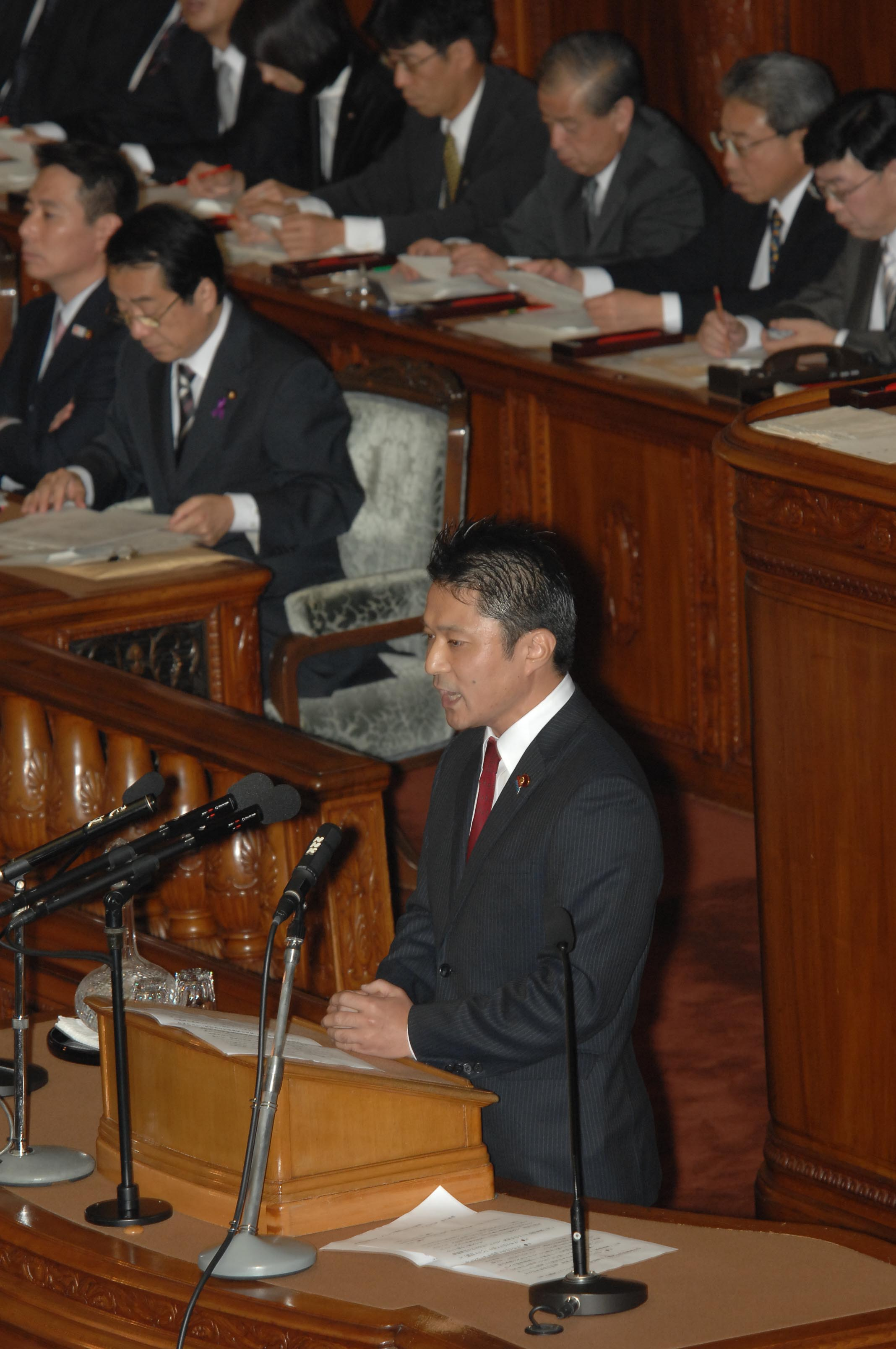 衆院本会議で発言する柿沢未途